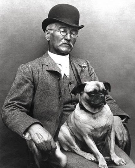 Peter MacOwan (1830-1909)